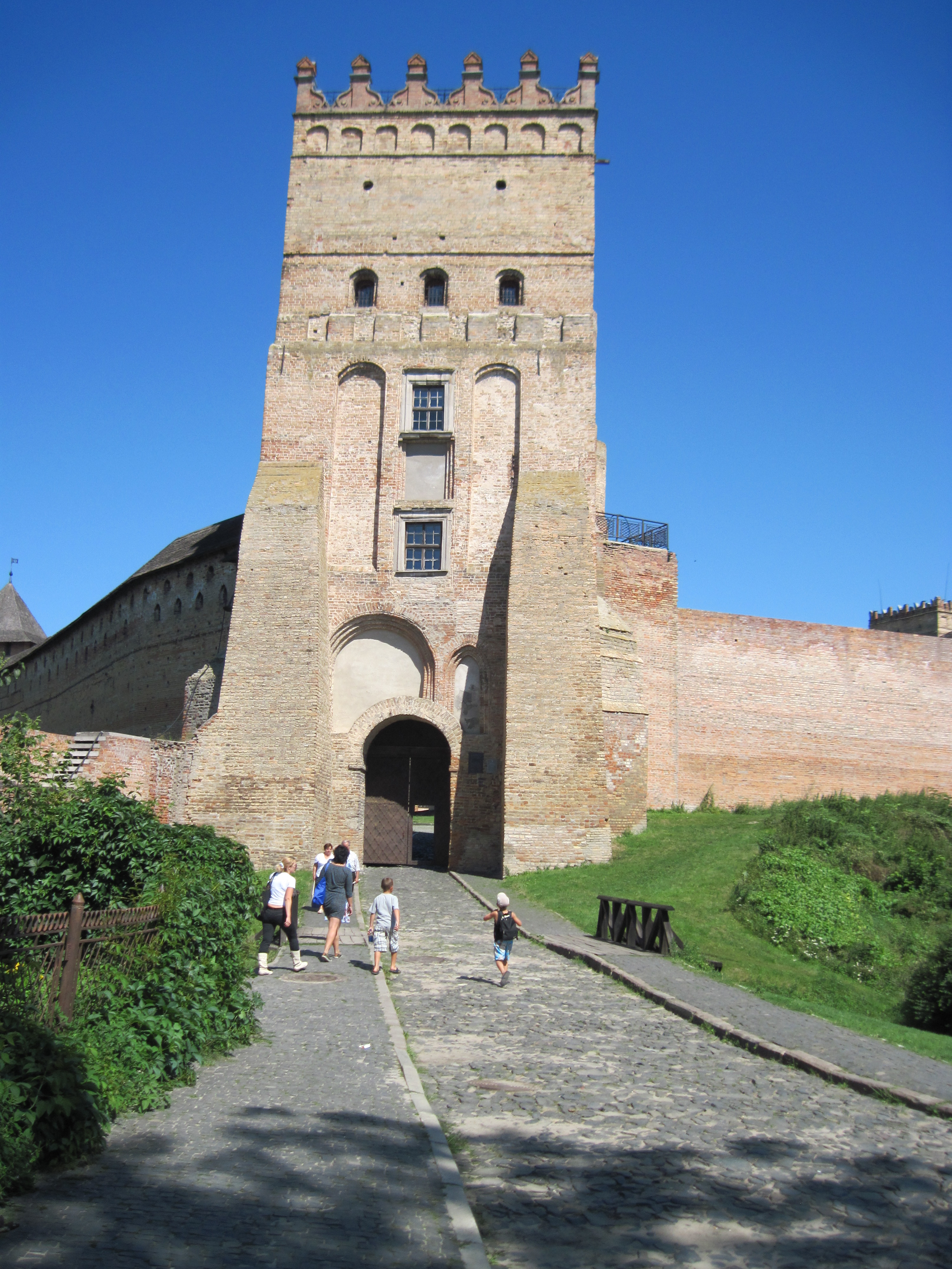 Украіна. Луцкі замак. Уязная вежа